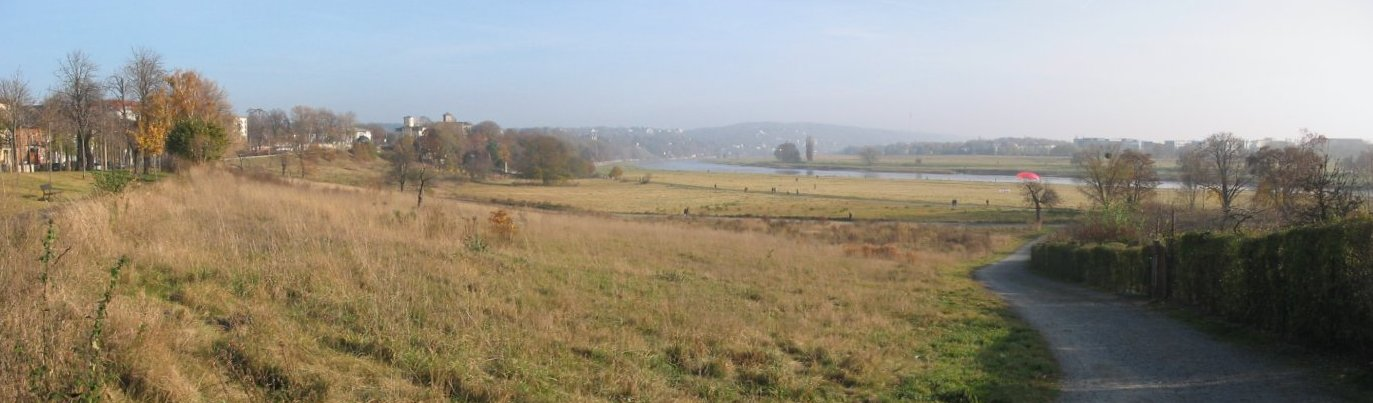 Die Elbwiesen unterhalb des Brauhaus am Waldschlösschen in Dresden am 13.11.2005. Bild aus 3 Fotografien mit Autostitch zusammengesetzt. Eine Version in höherer Auflösung kann ich bei Bedarf herstellen. Die EXIF-Daten im Bild sind vermutlich bei der Erstellung des Panoramas zerstört worden und sind nicht mehr zuverlässig.